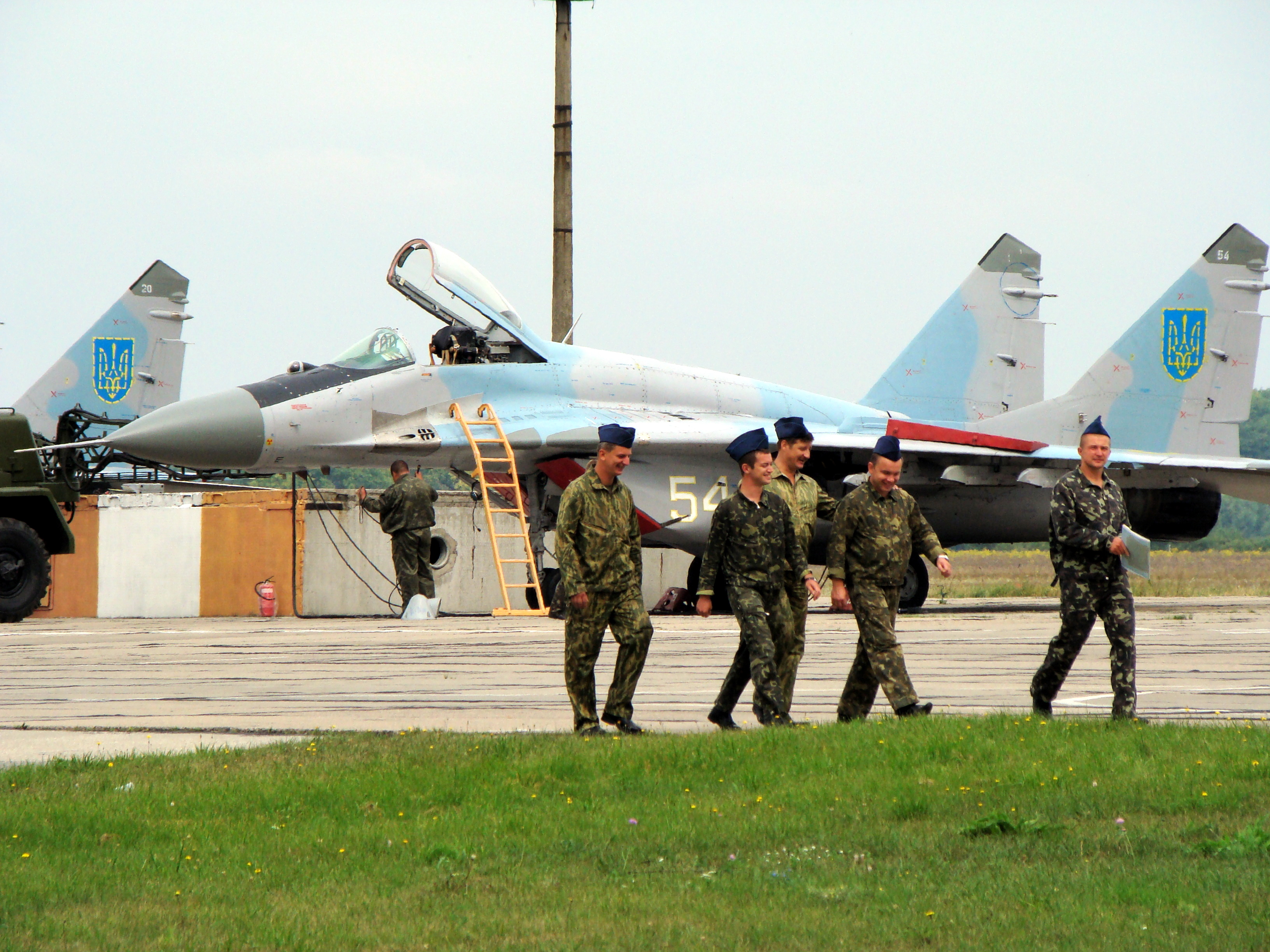 МиГ-29 Украинских Воздушных сил